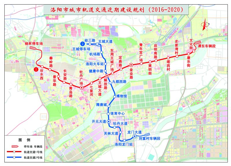 洛阳市轨道交通近期建设站点设置（1号线+2号线一期）